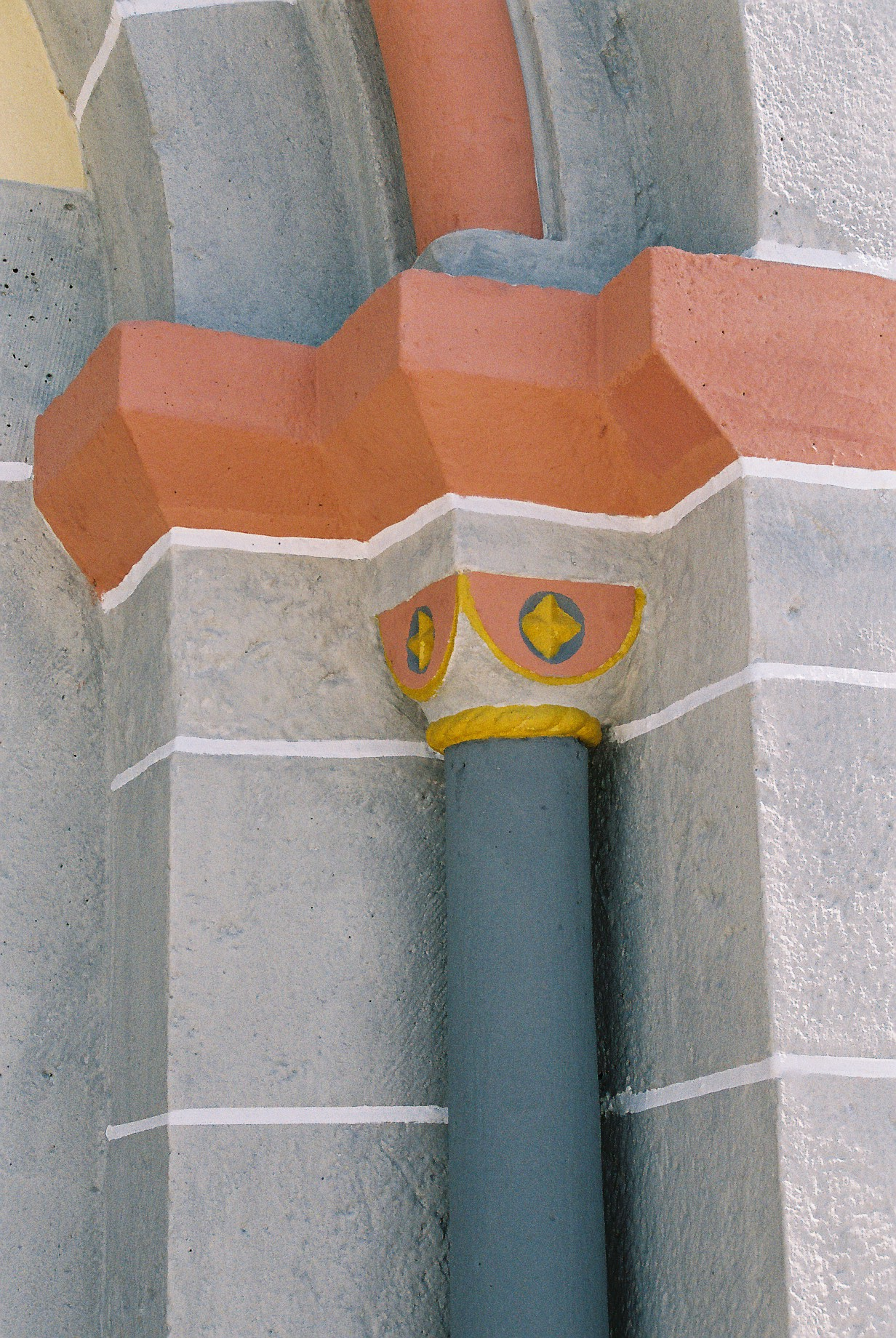 Kath. Pfarrkirche St. Servatius in Winterscheid, Säule am Westportal